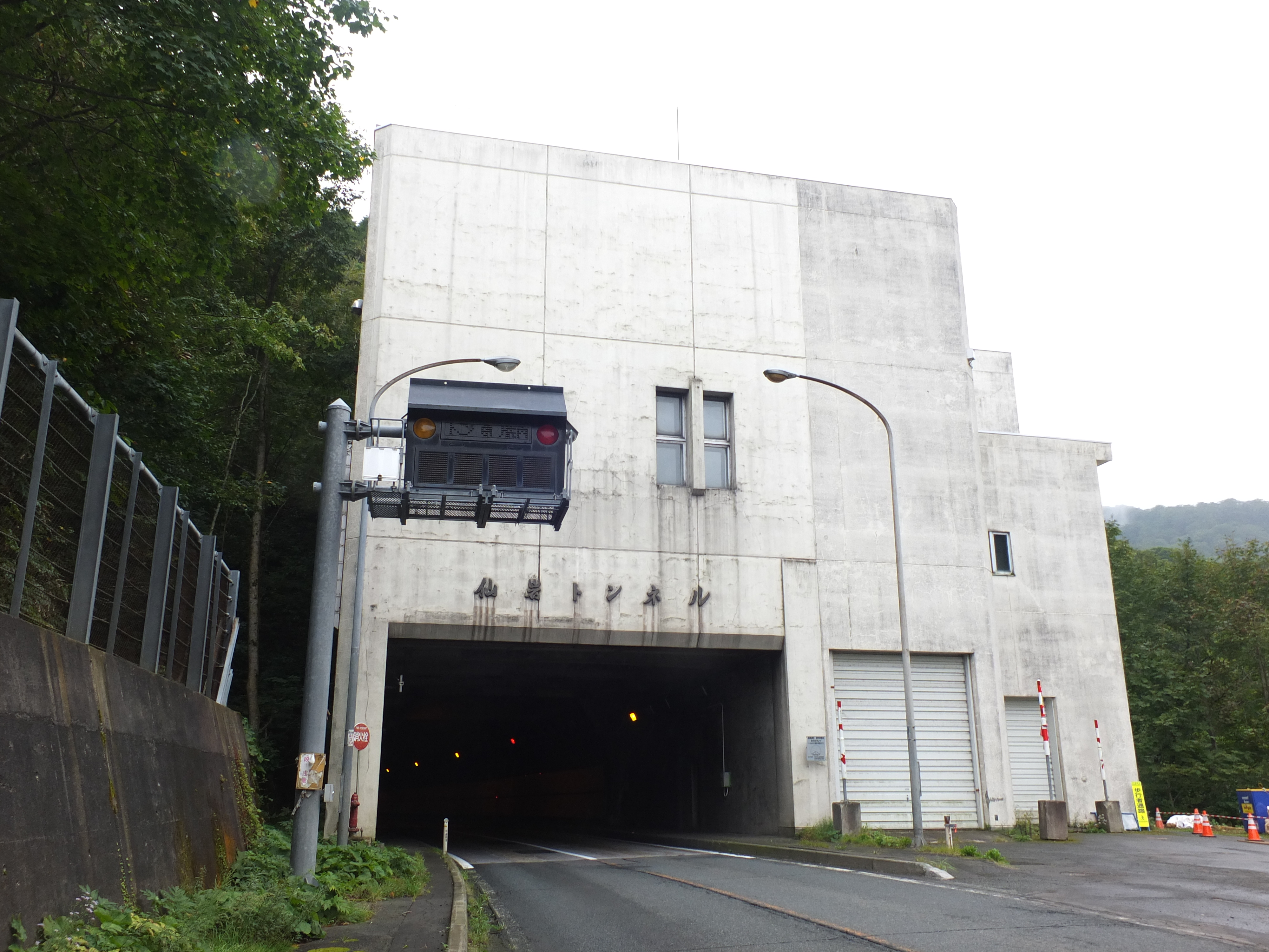 国道46号仙岩道路にある仙岩トンネルの岩手換気所